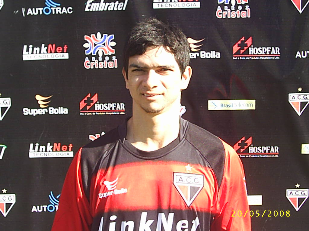 Nome: Anailson Brito Noleto Apelido: Anailson Idade: 30 anos Posição: Meia Altura: 1,64m Peso: 57kg Clube Anterior: Verdy Tokyo (Japão)